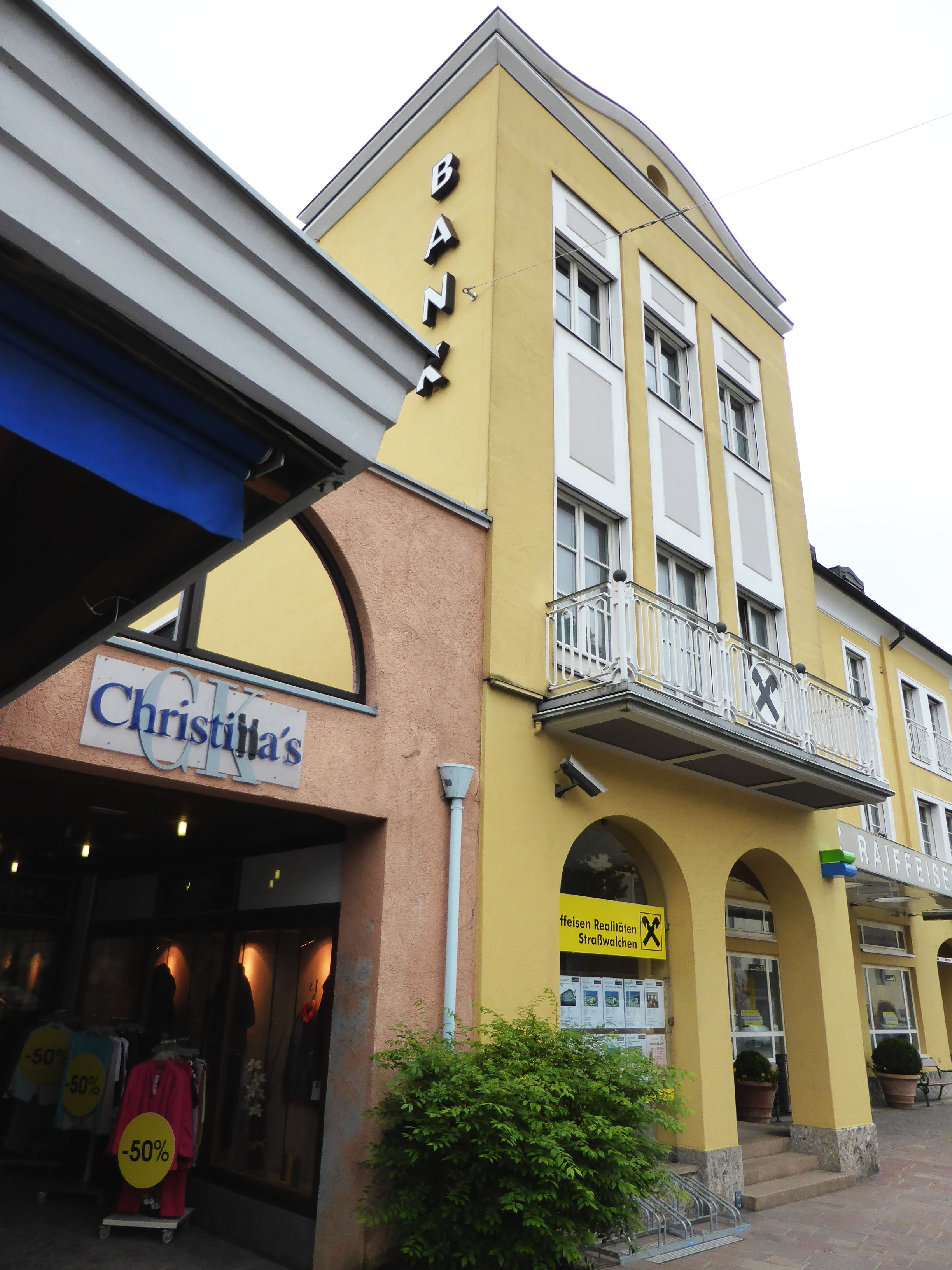 Gebäude an der Stelle des ehemaligen Pfleggerichts Straßwalchen